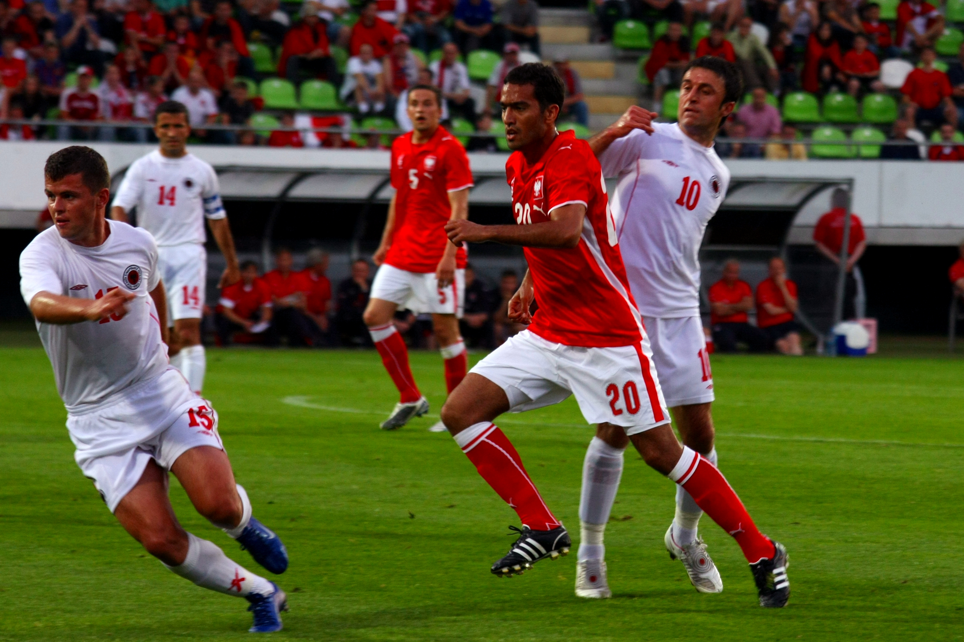 Roger Guerreiro